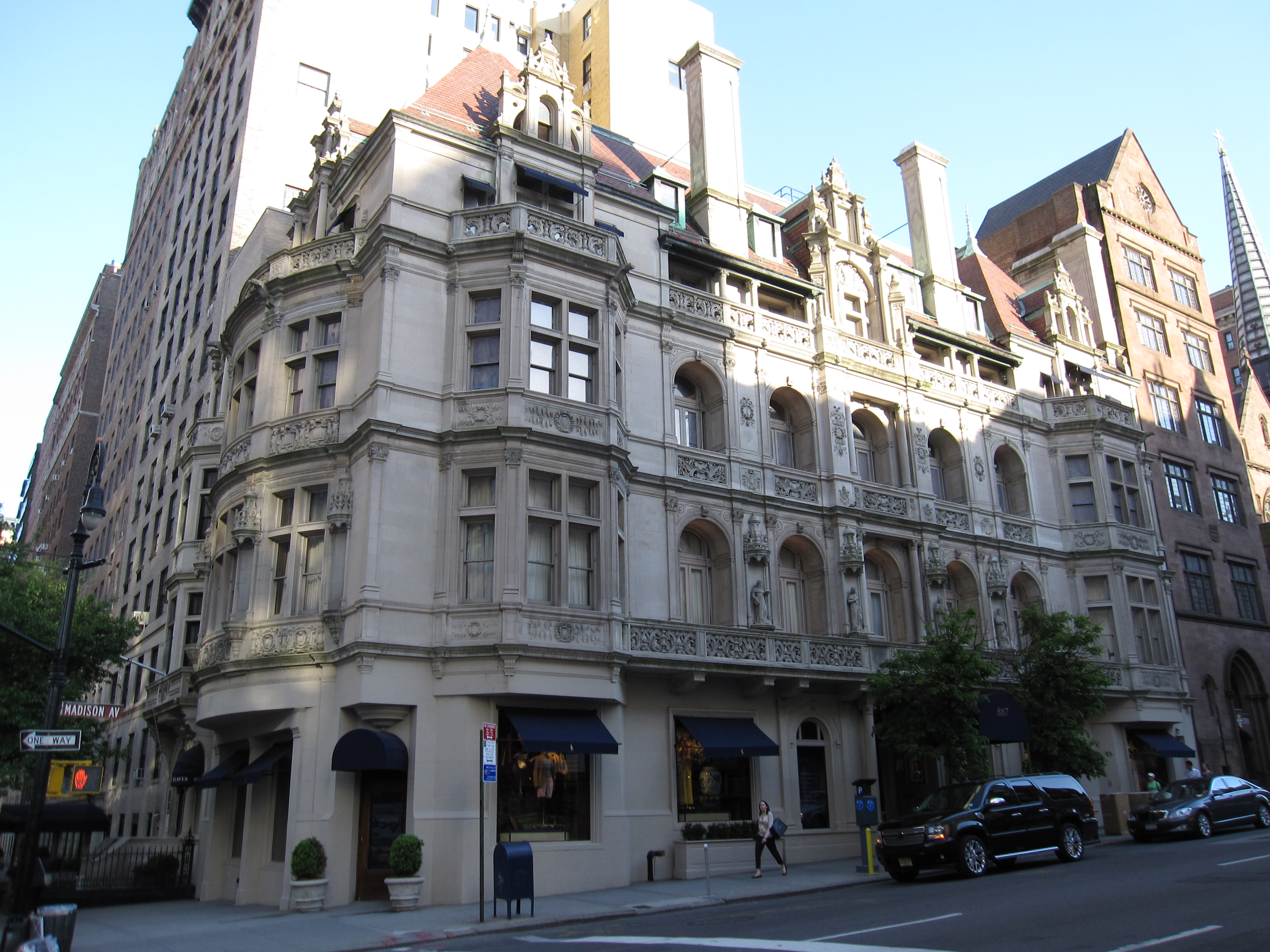 Gertrude Rhinelander Waldo Mansion